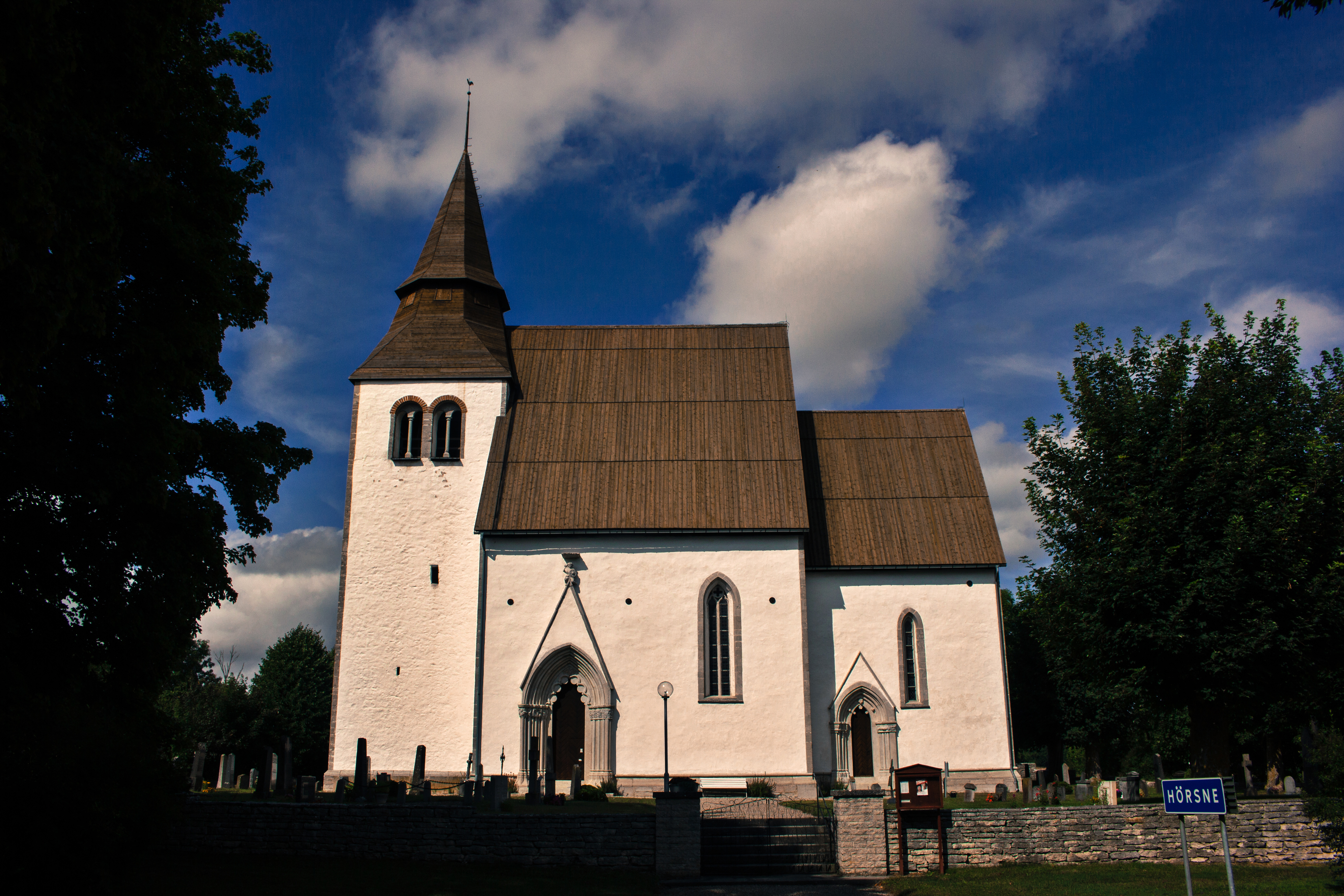 Igrexa de Hörsne, en Gotland.